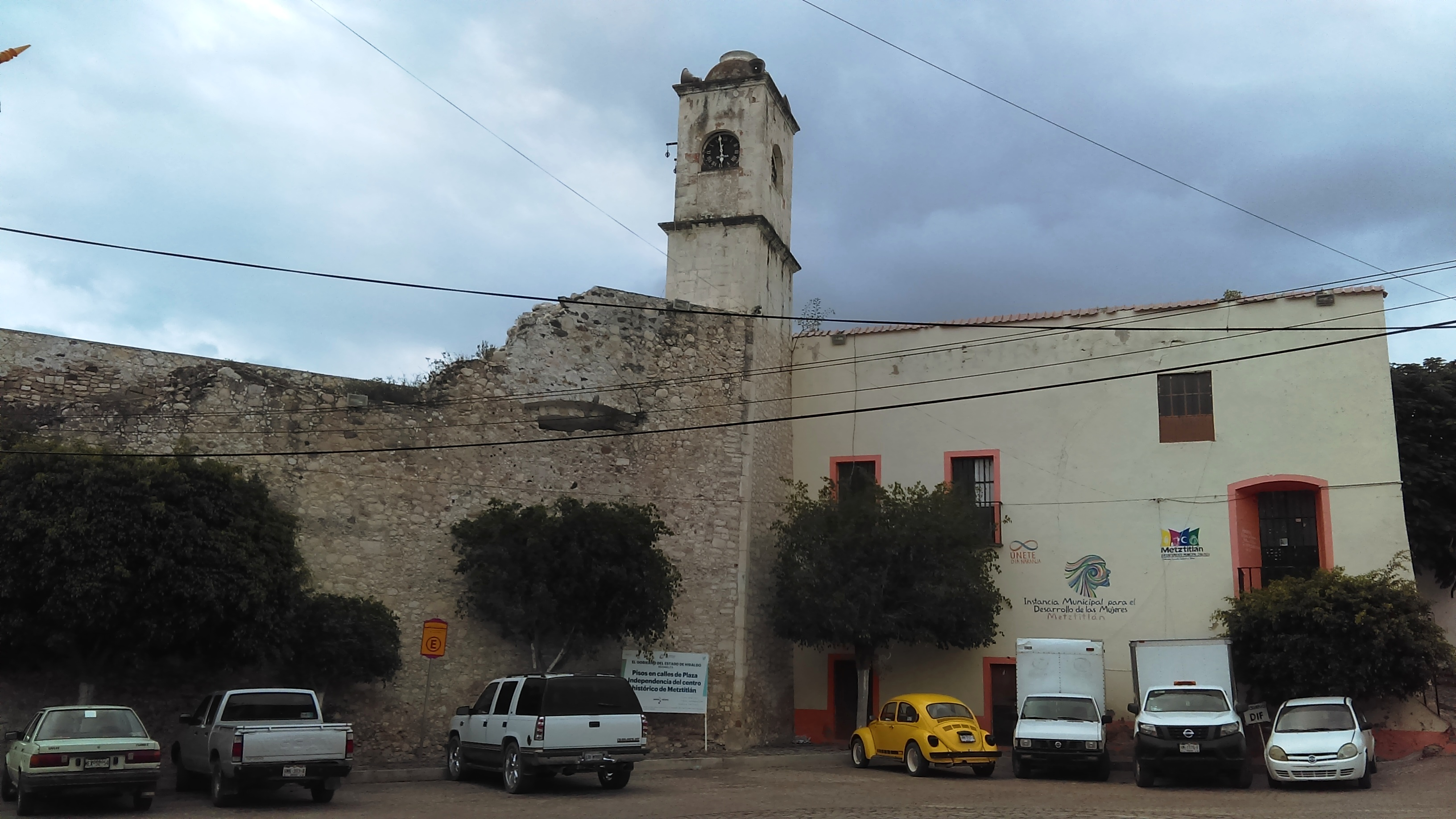 Edifico La Comunidad en Metztitlán, Hidalgo, México.